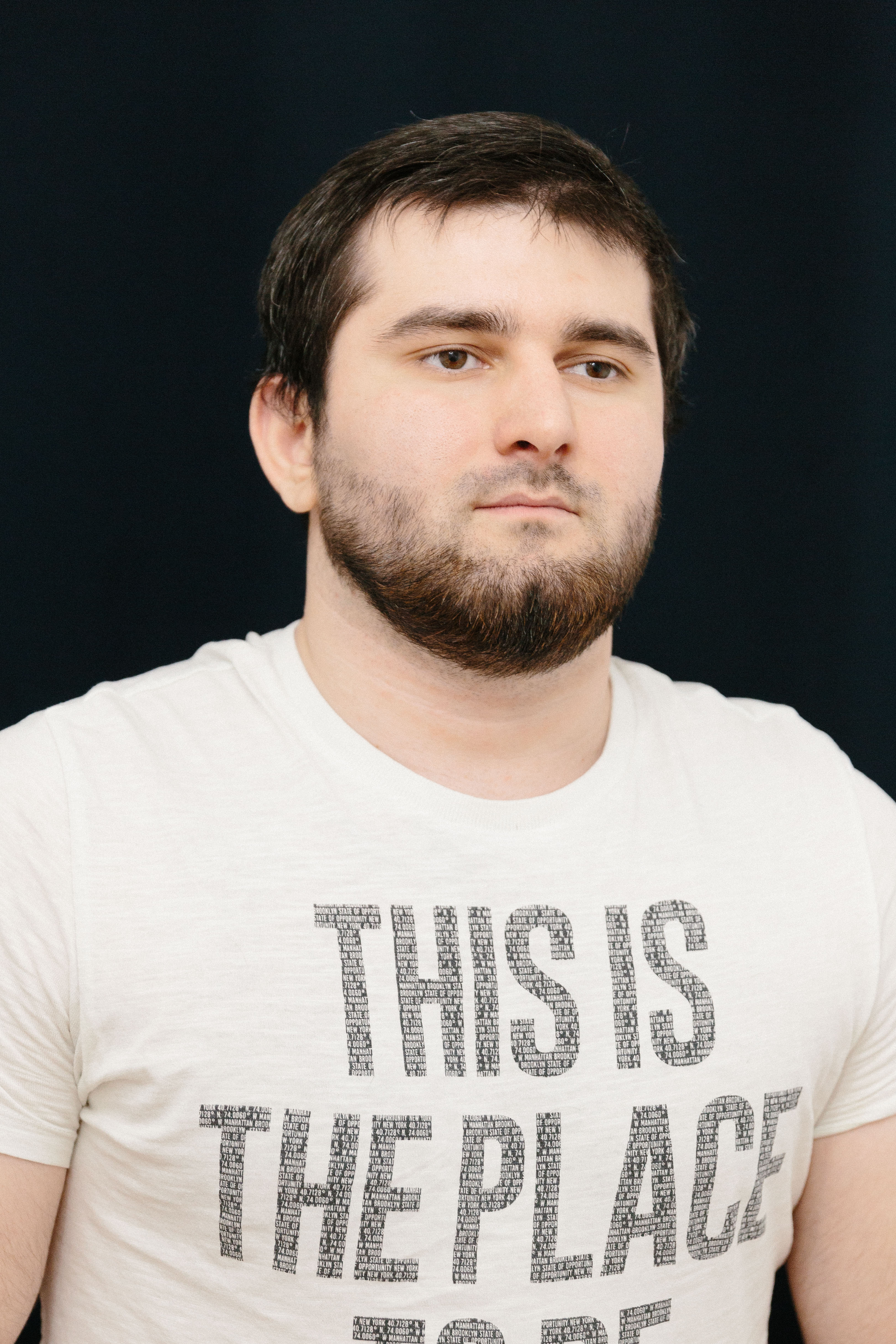 портрет Гасан Гасанова